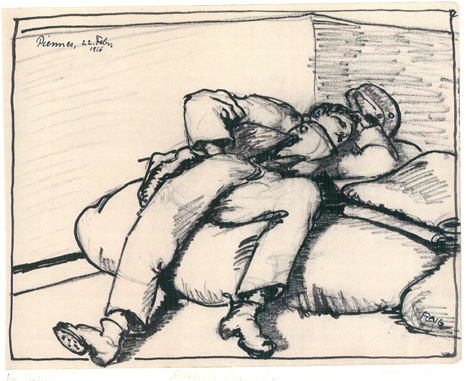 Zeichnung aus dem Kriegstagebuch von Waldemar Flaig (1. Weltkrieg) Blatt 11, Schlafender Kamerad, 1916